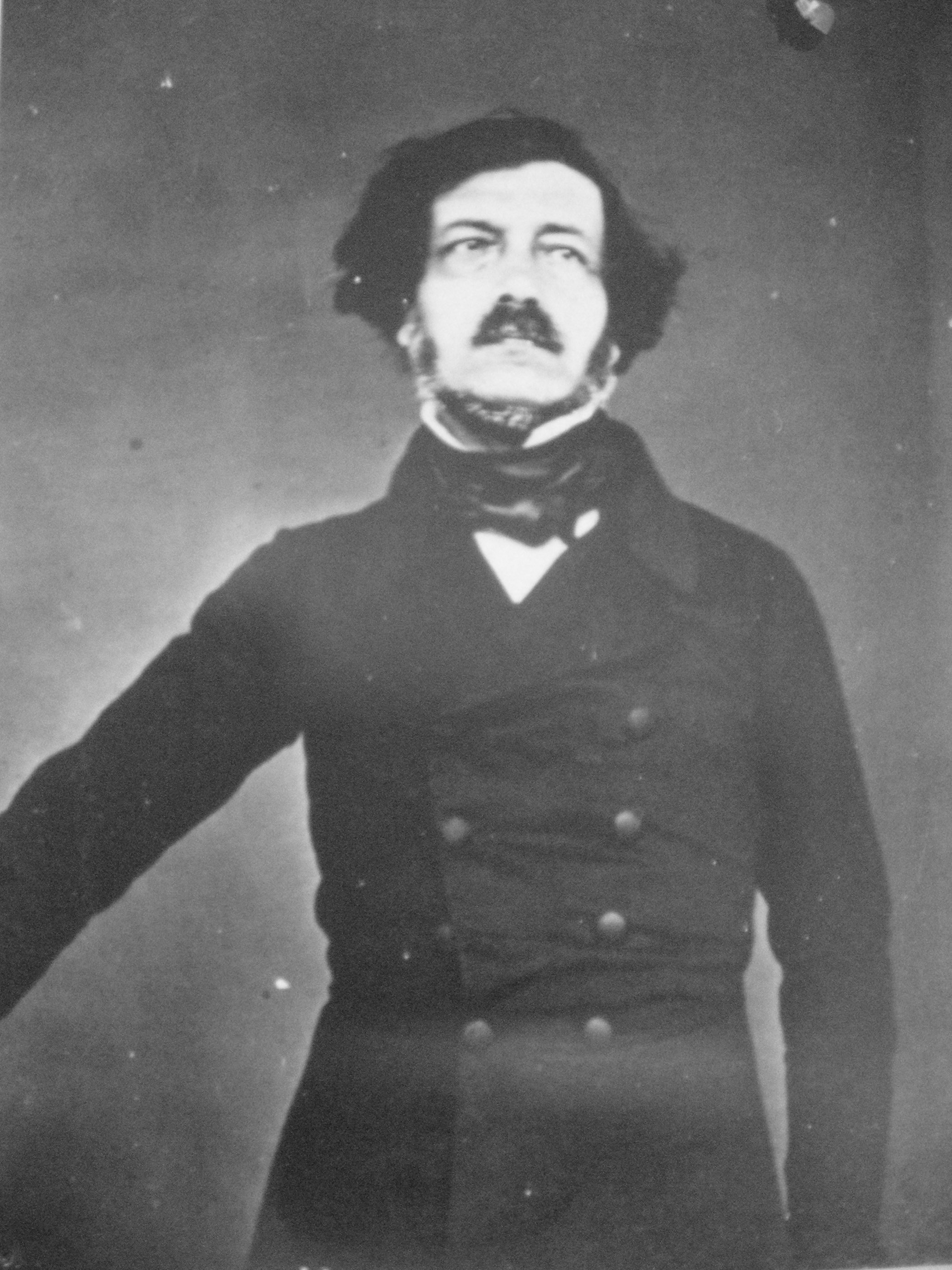 Franz Xaver Winterhalter aufgenommen von Dr. E. Becker (1826-88), Hobbyfotograf und Bibliothekar Prinz Alberts.